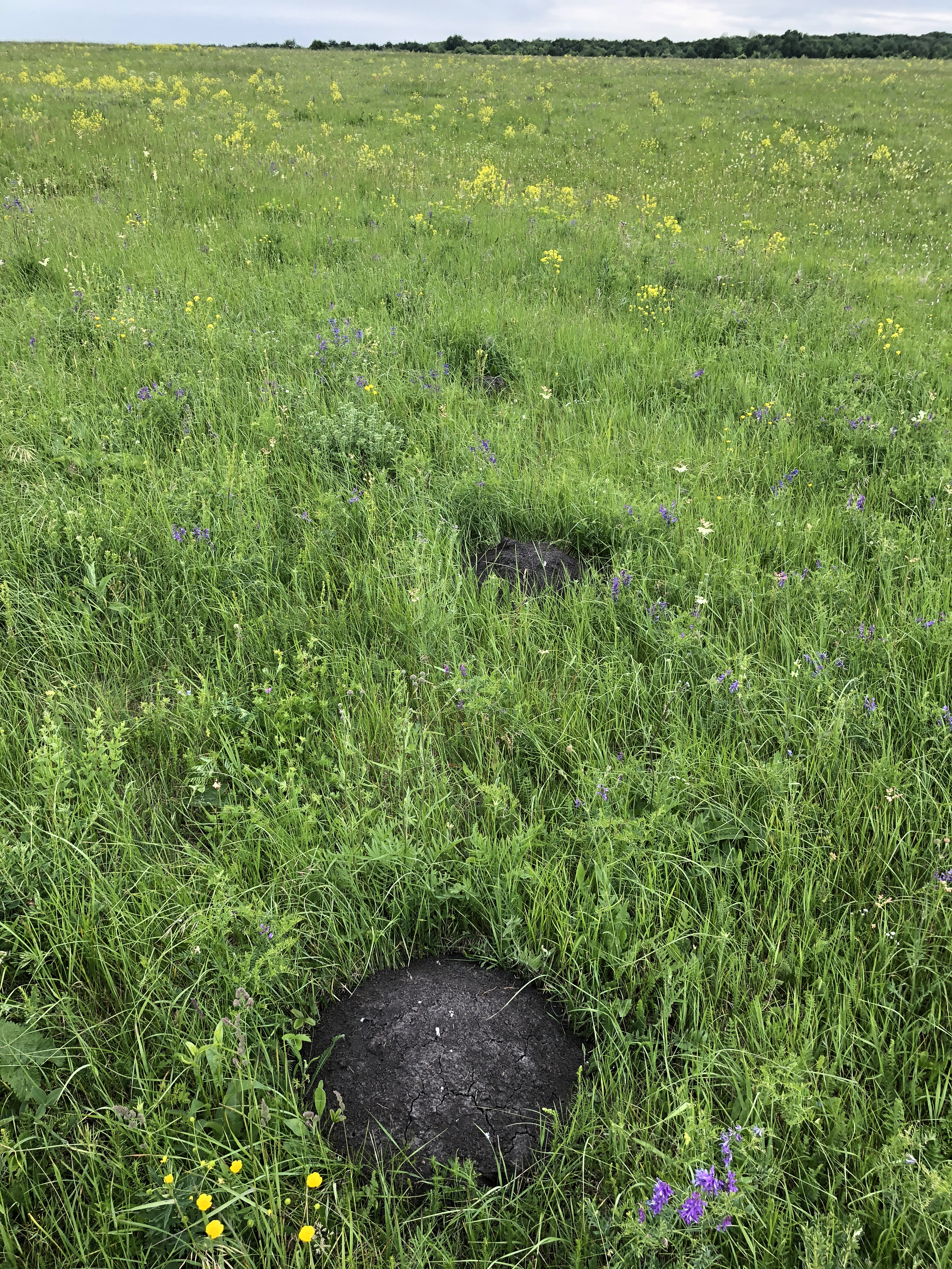 Meadow steppe, Kursk region